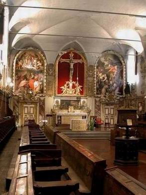 Coro monastico (1558-64), s. caterina di prato